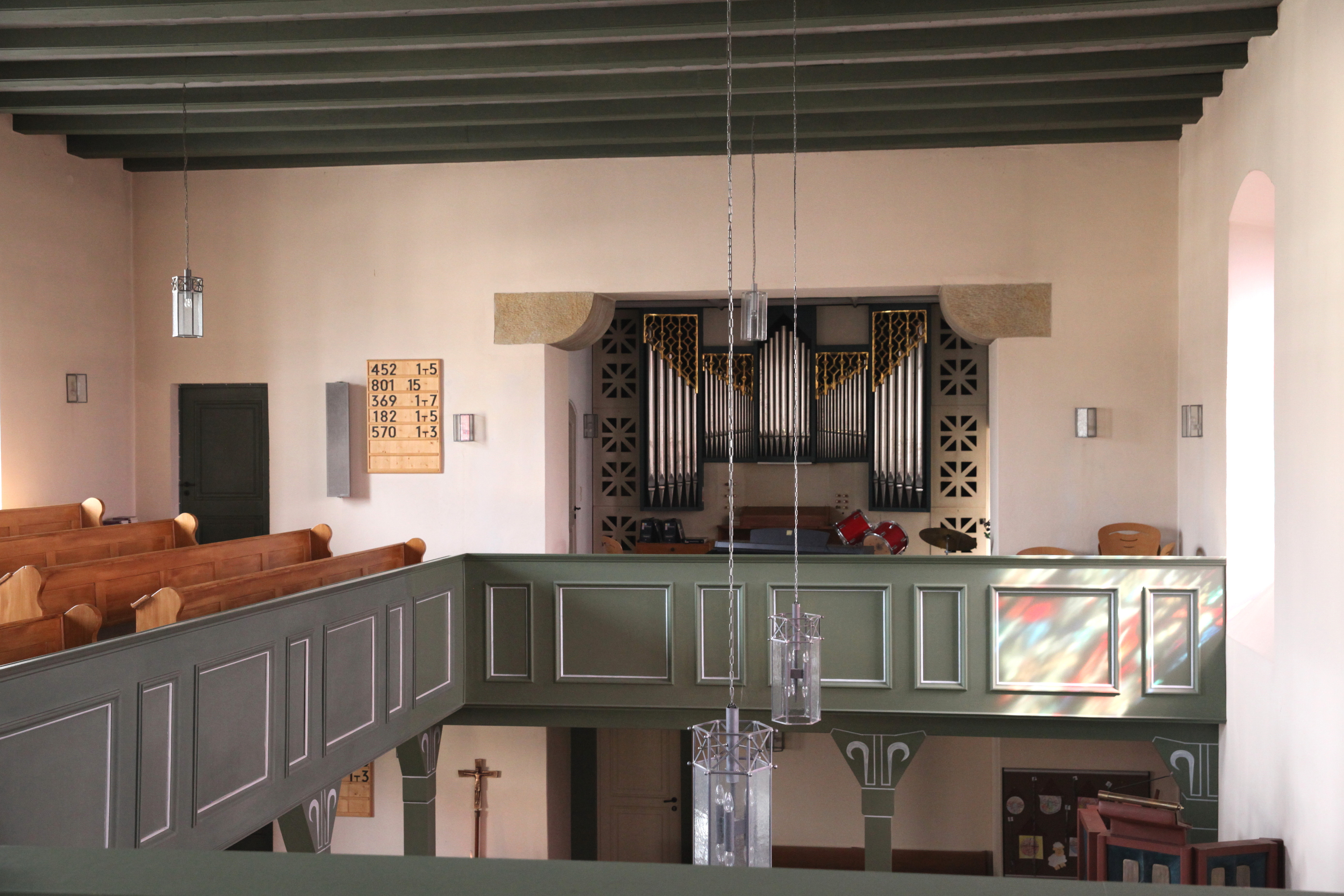 Empore und Orgel, Pfarrkirche St. Laurentius in Ebersdorf bei Coburg